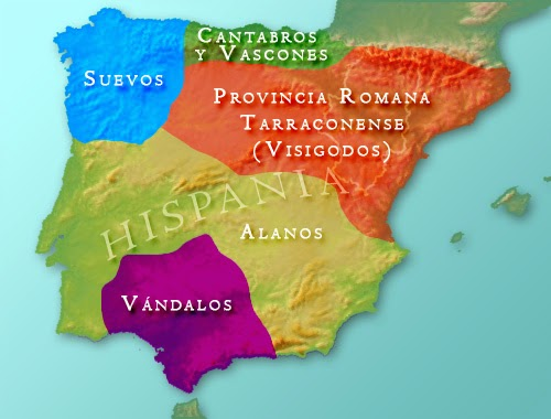 Ocupação dos povos bárbaros no Império Romano.